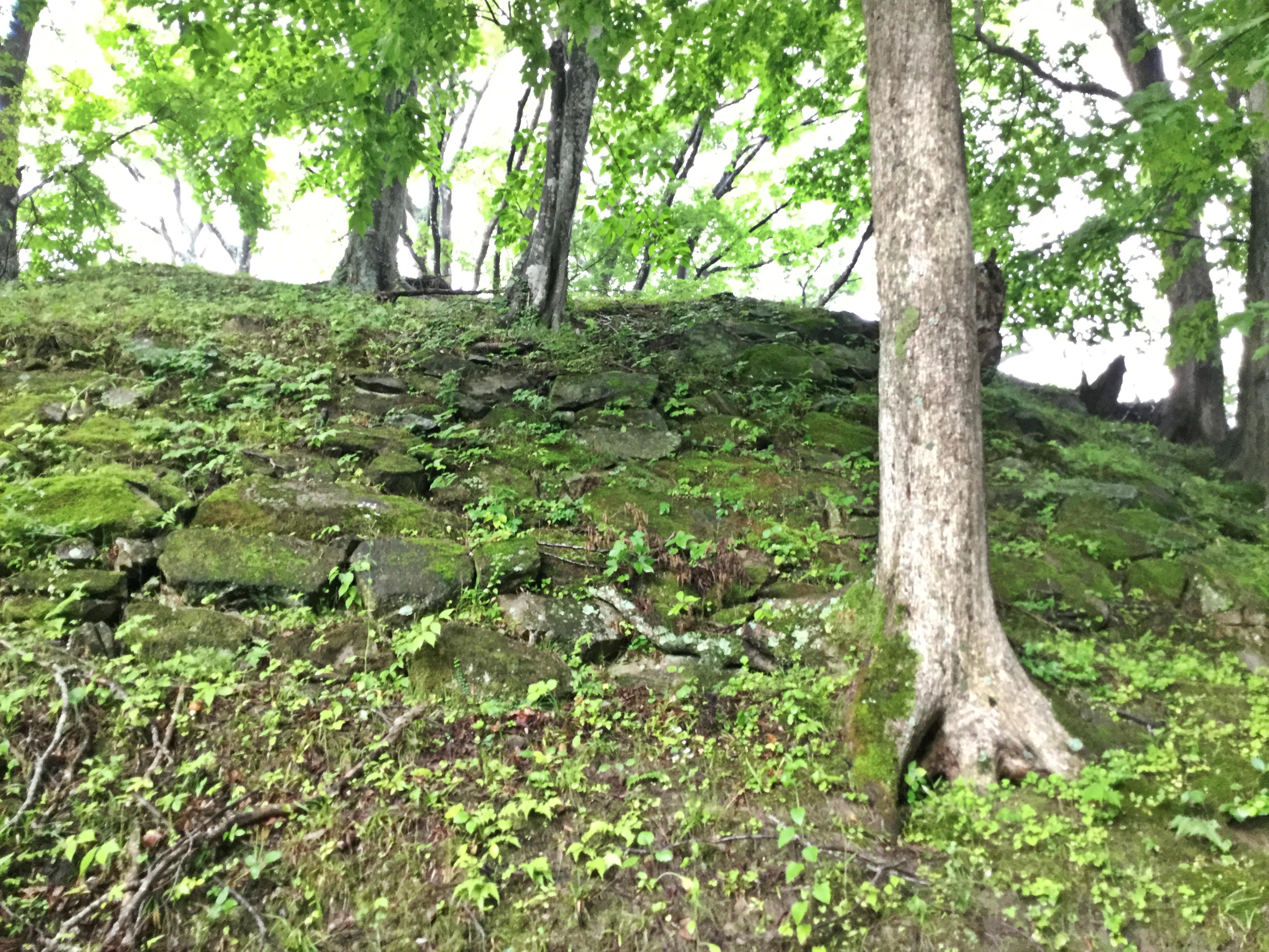 福島県三春町 三春城跡 城山公園 石垣